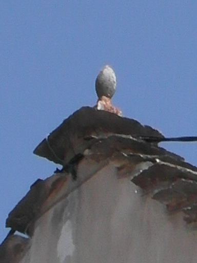 Couve sur le toit d'une maison de Villard